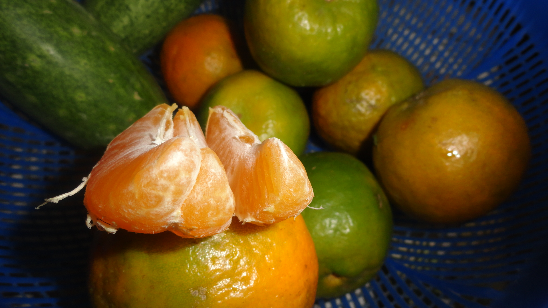 ಕನ್ನಡ: ಕಿತ್ತಳೆ ಹಣ್ಣು